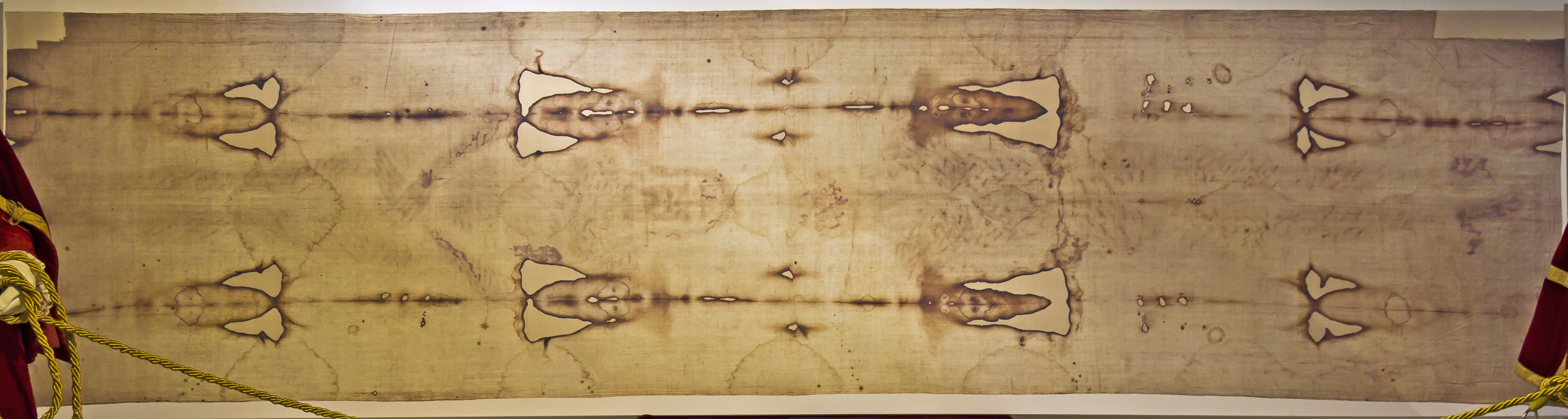 Replica de la Sábana Santa de Torino en el Real Santuario del Santísimo Cristo de La Laguna